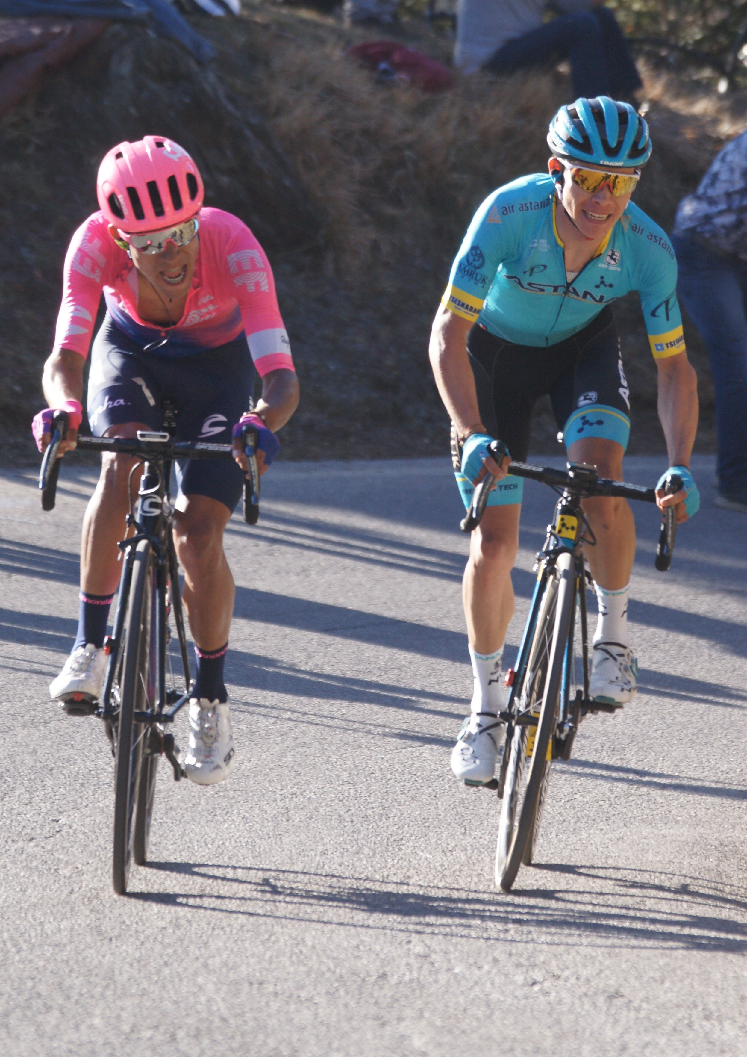 Daniel Martinez et Miguel Angel Lopez, Paris-Nice 2019